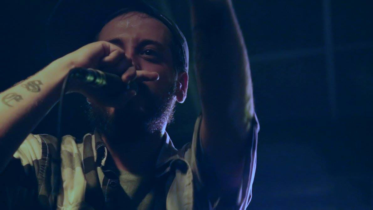 Seih componente de Crew Cuervos, BeatUpBeats, El Artefuckto, XIII